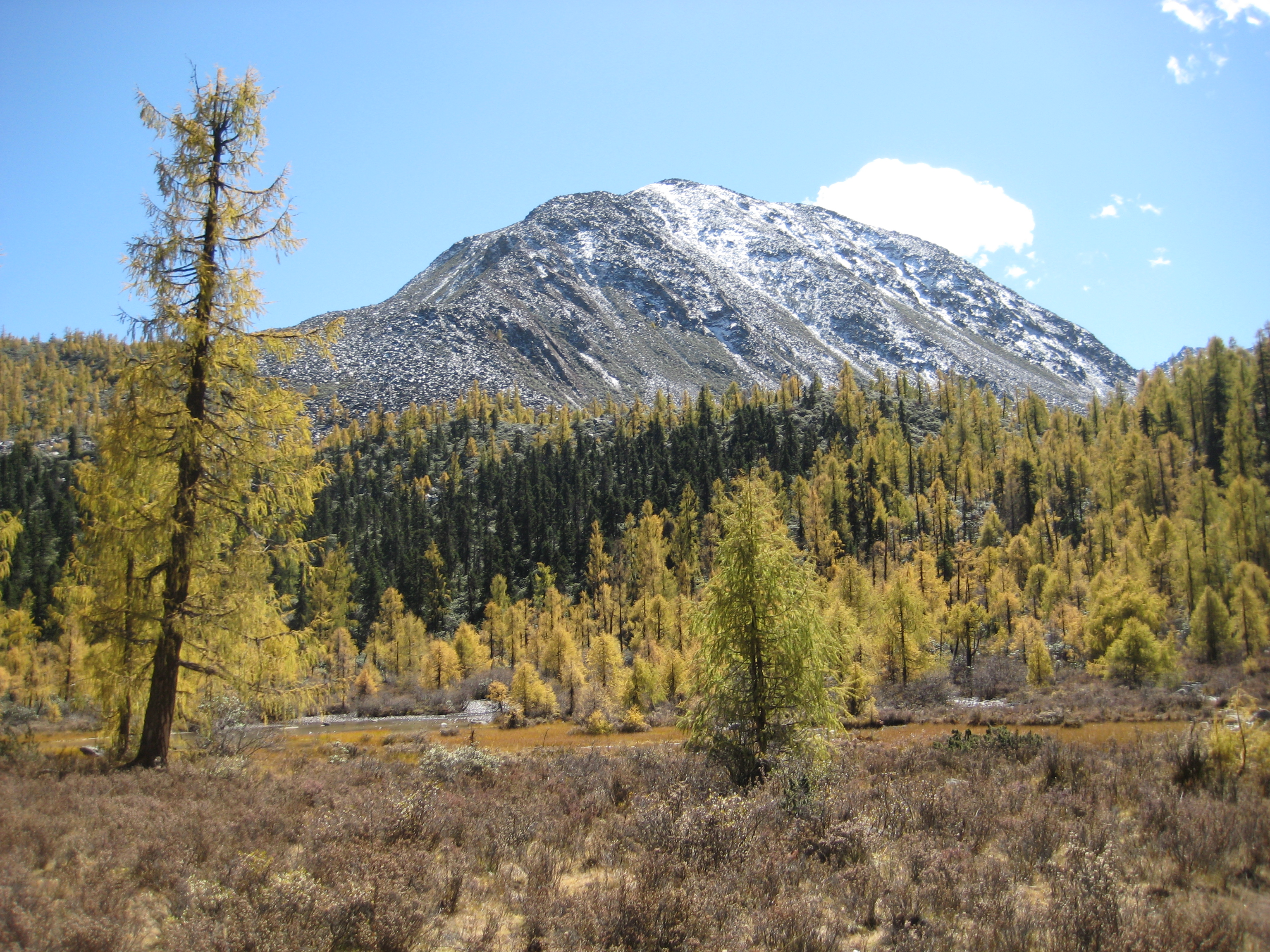 Larix potaninii forest, Ganzi Zangzu, Huluhai 葫芦海, Sichuan 四川, China 31°4'03"N 101°21'56"E, 4100m altitude.